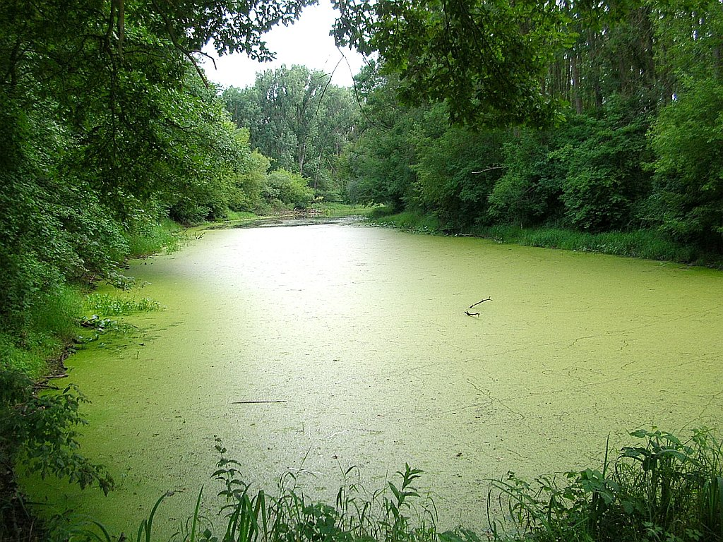 Rezerwat przyrody Wielka Kępa Ostromecka k Bydgoszczy